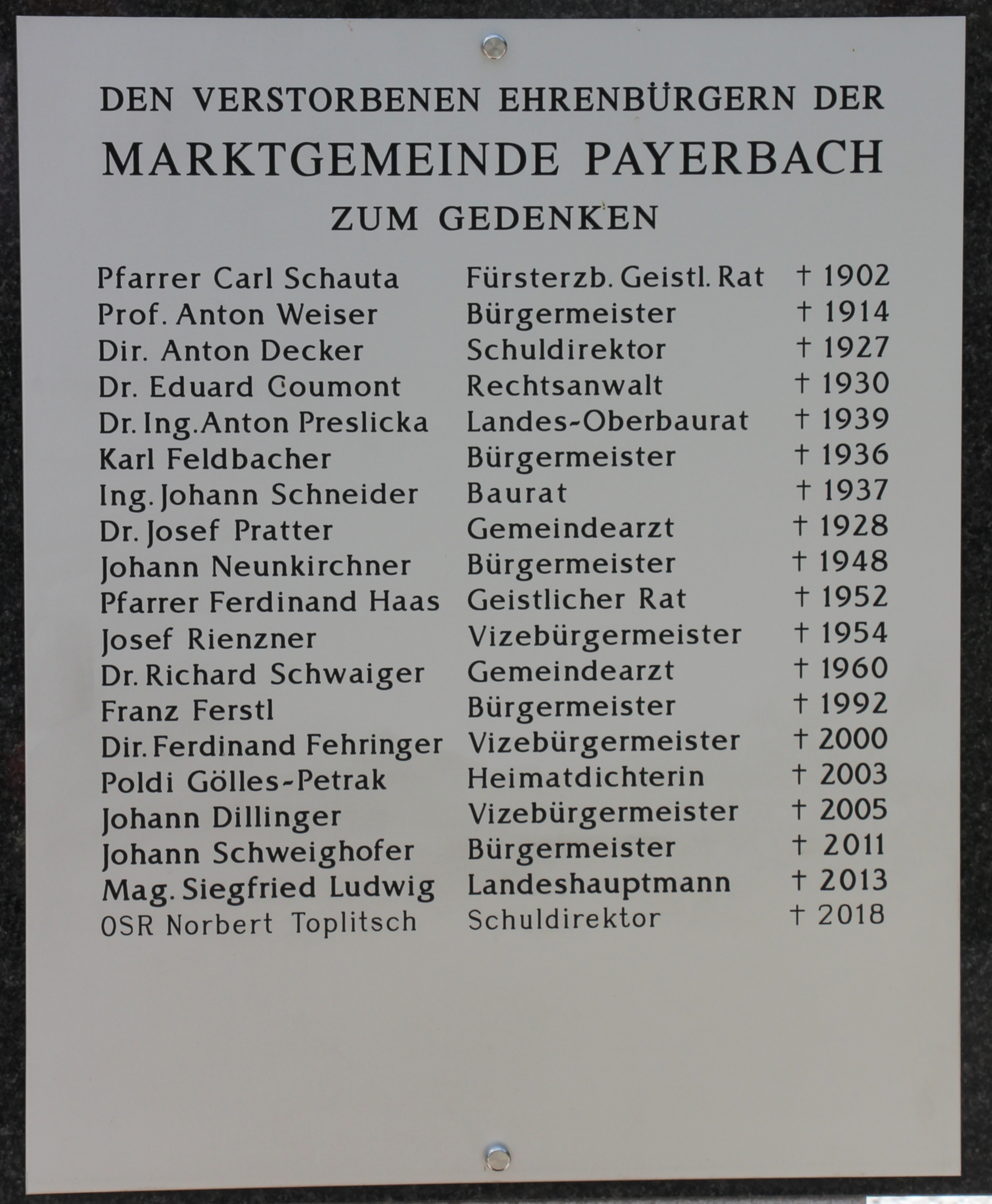 Denkmal für die Ehrenbürger Payerbachs und der Kriegsopfer, die im letzten Kriegsmonat am Gemeindegebeit ums Leben kamen am Friedhof Payerbach